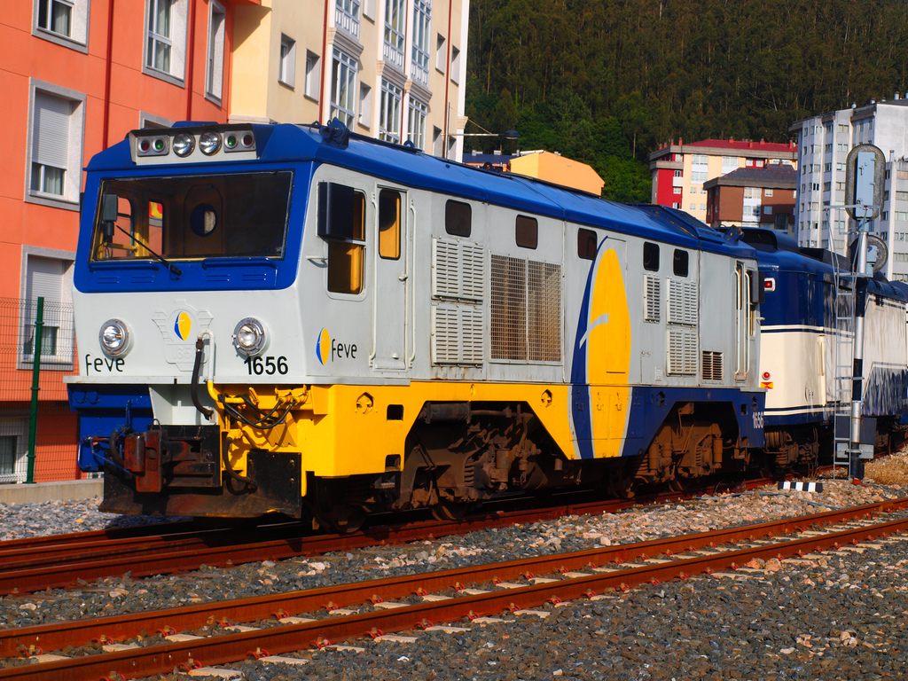 Cabeza tractora del tren de Lujo Transcantábrico. Fotografía tomada durante una parada en Viveiro.